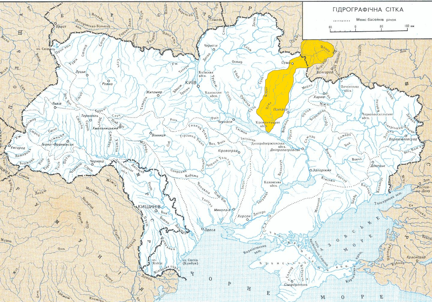 Бассейн реки Псёл.